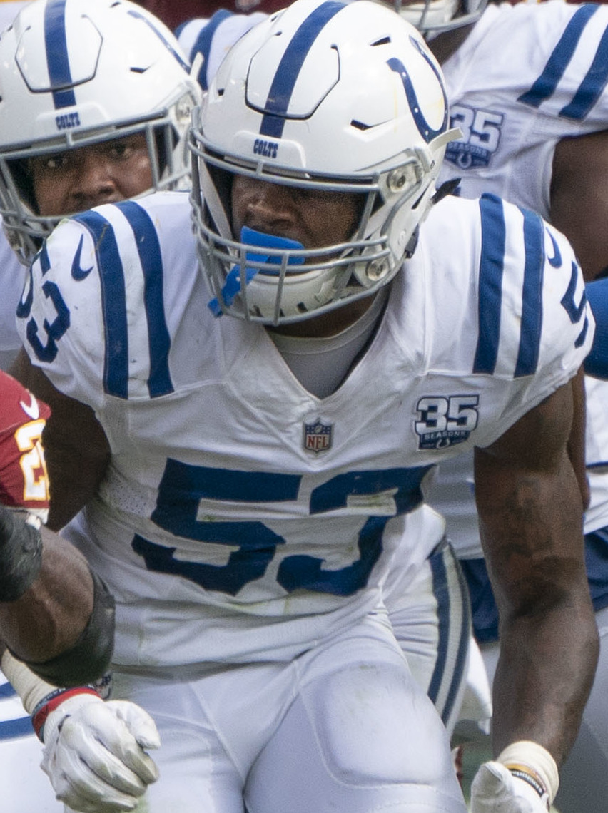 Colts at Redskins 09/16/18